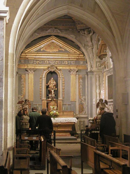 Commune de Robion (Vaucluse) Église chapelle du Rosaire Photo personnelle prise le 22 avril 2005 Turris